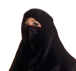 Toyra verschleiert mit Niqab und Khimar